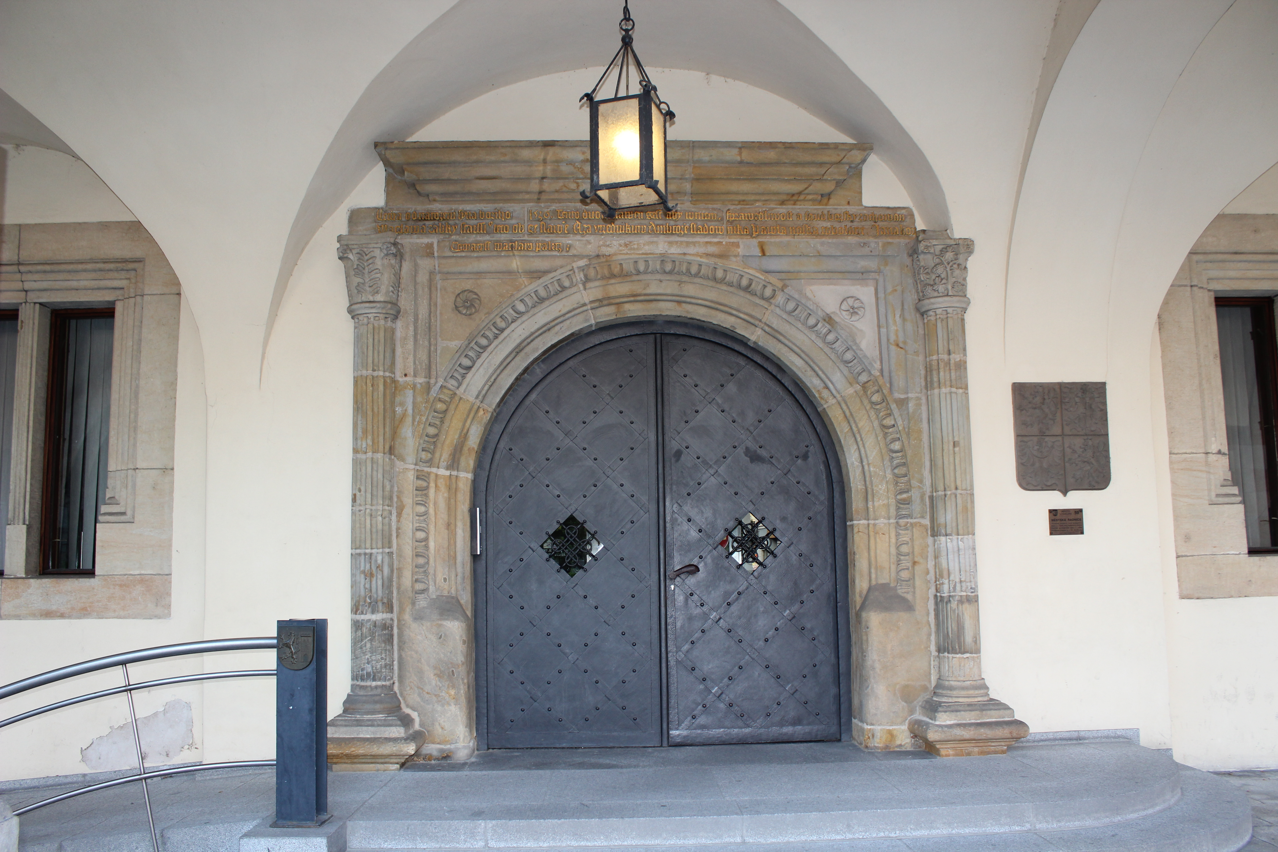 Vstup na nymburskou radnici na náměstí Přemyslovců (náměstí Přemyslovců 163/20), pohled od východu).